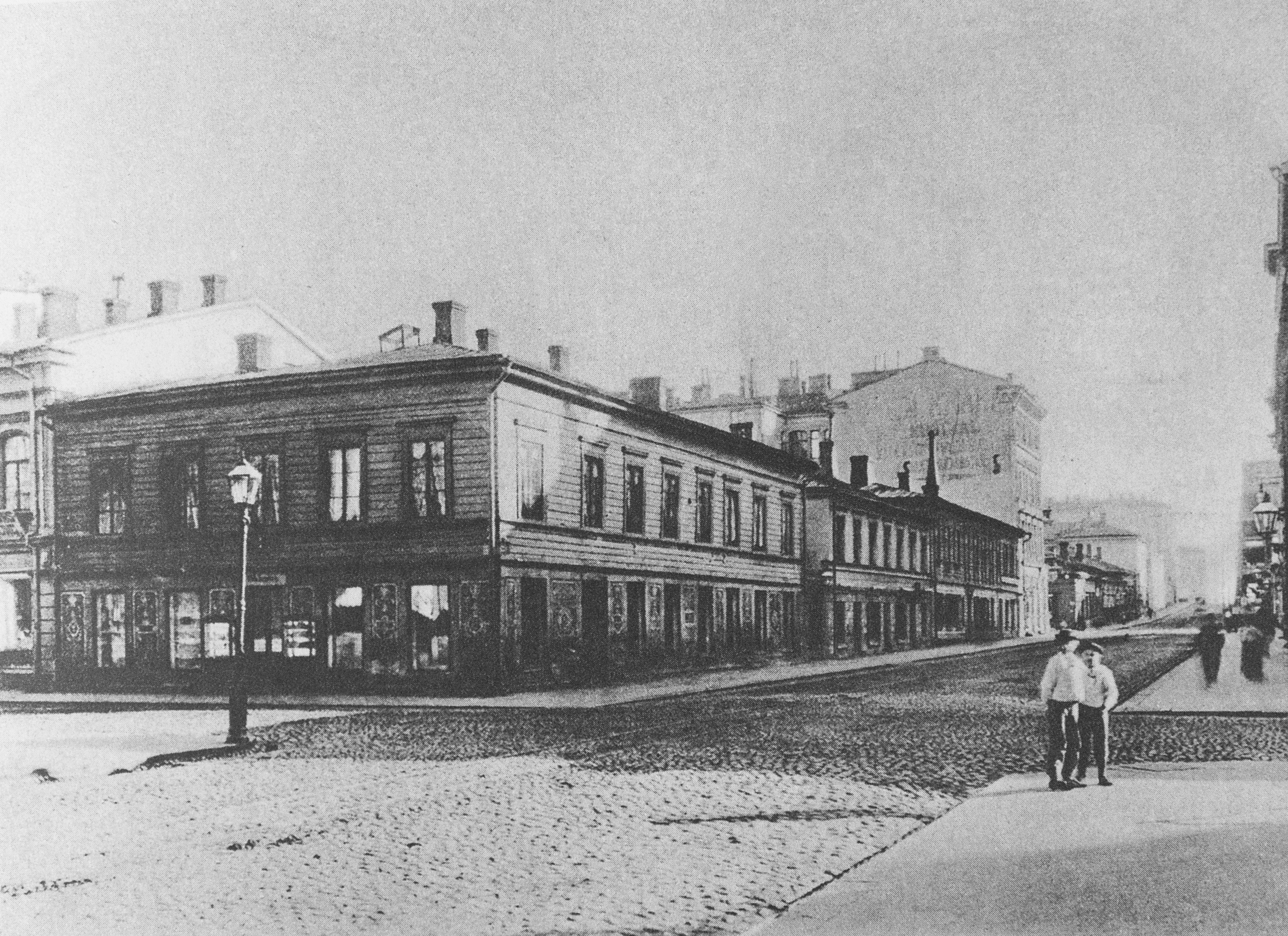 Aleksanterinkatu 1880-luvulla.